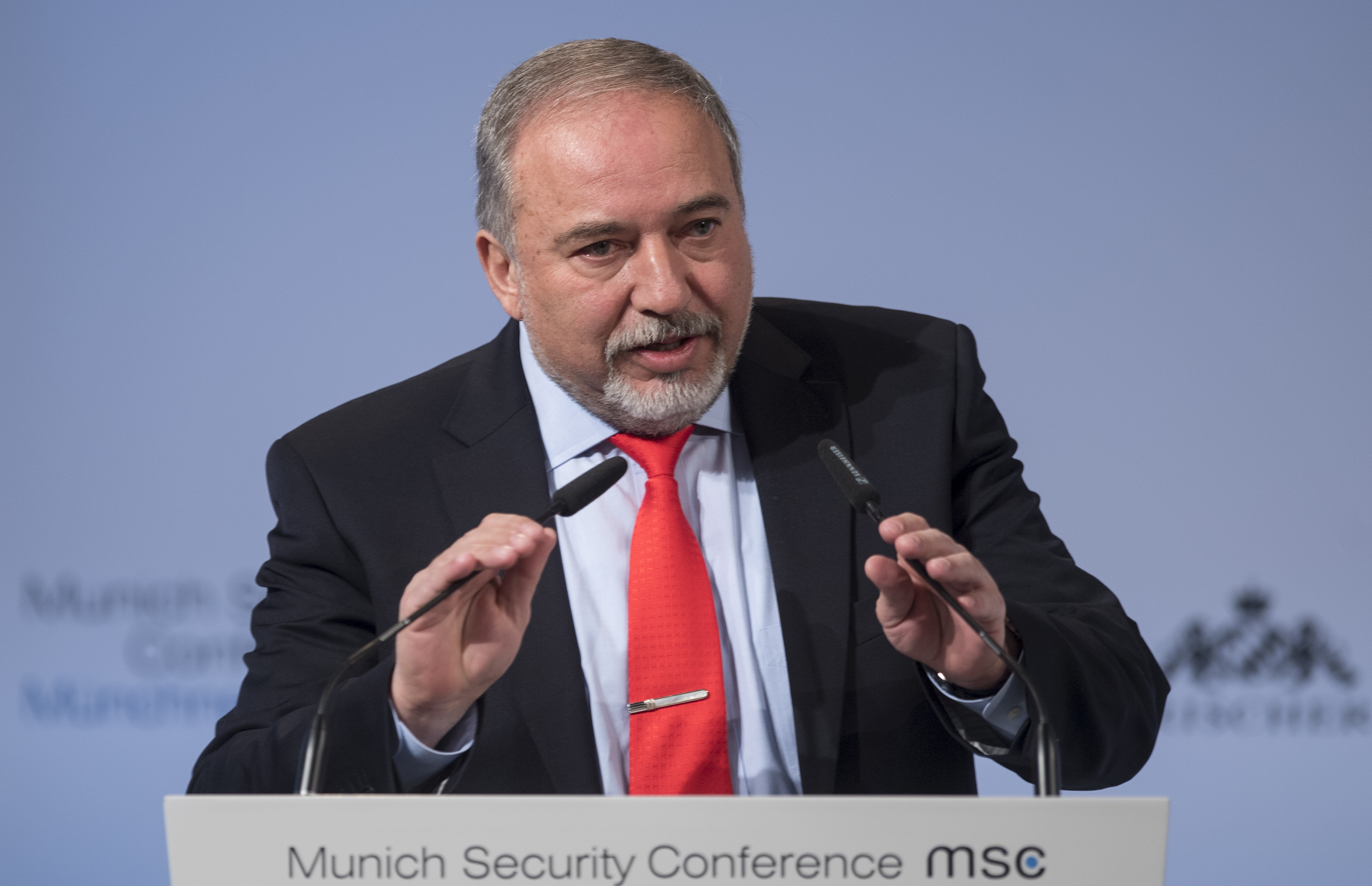 Avigdor Lieberman während der Münchner Sicherheitskonferenz 2017